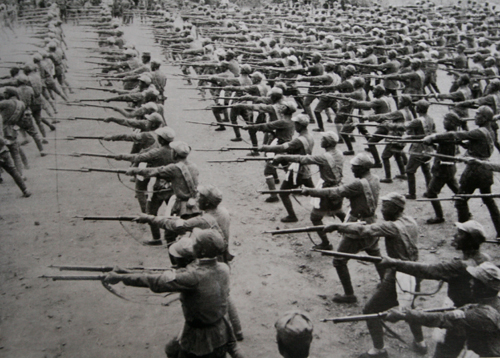 山西新军的干部战士在进行刺杀训练